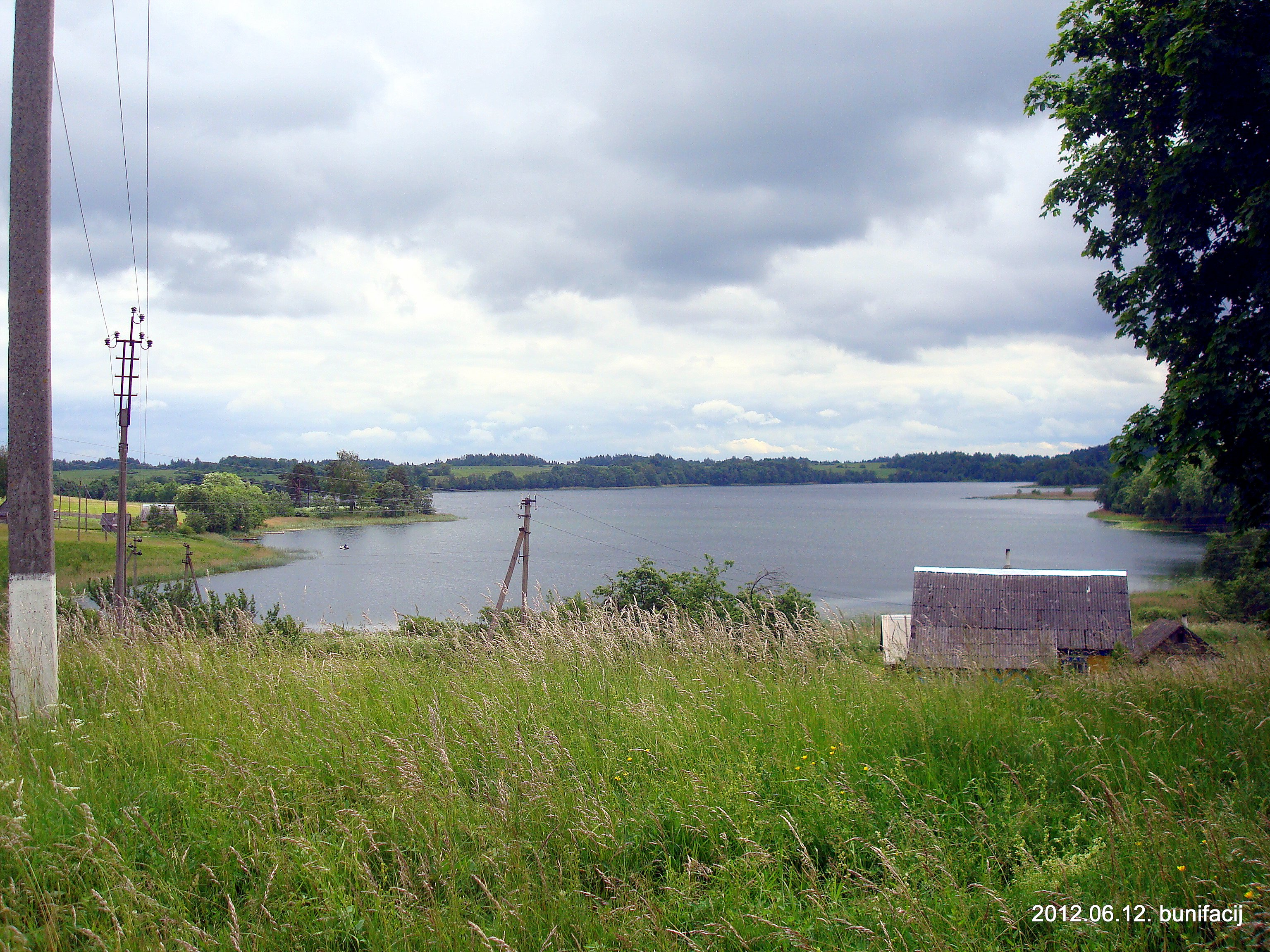 Озеро